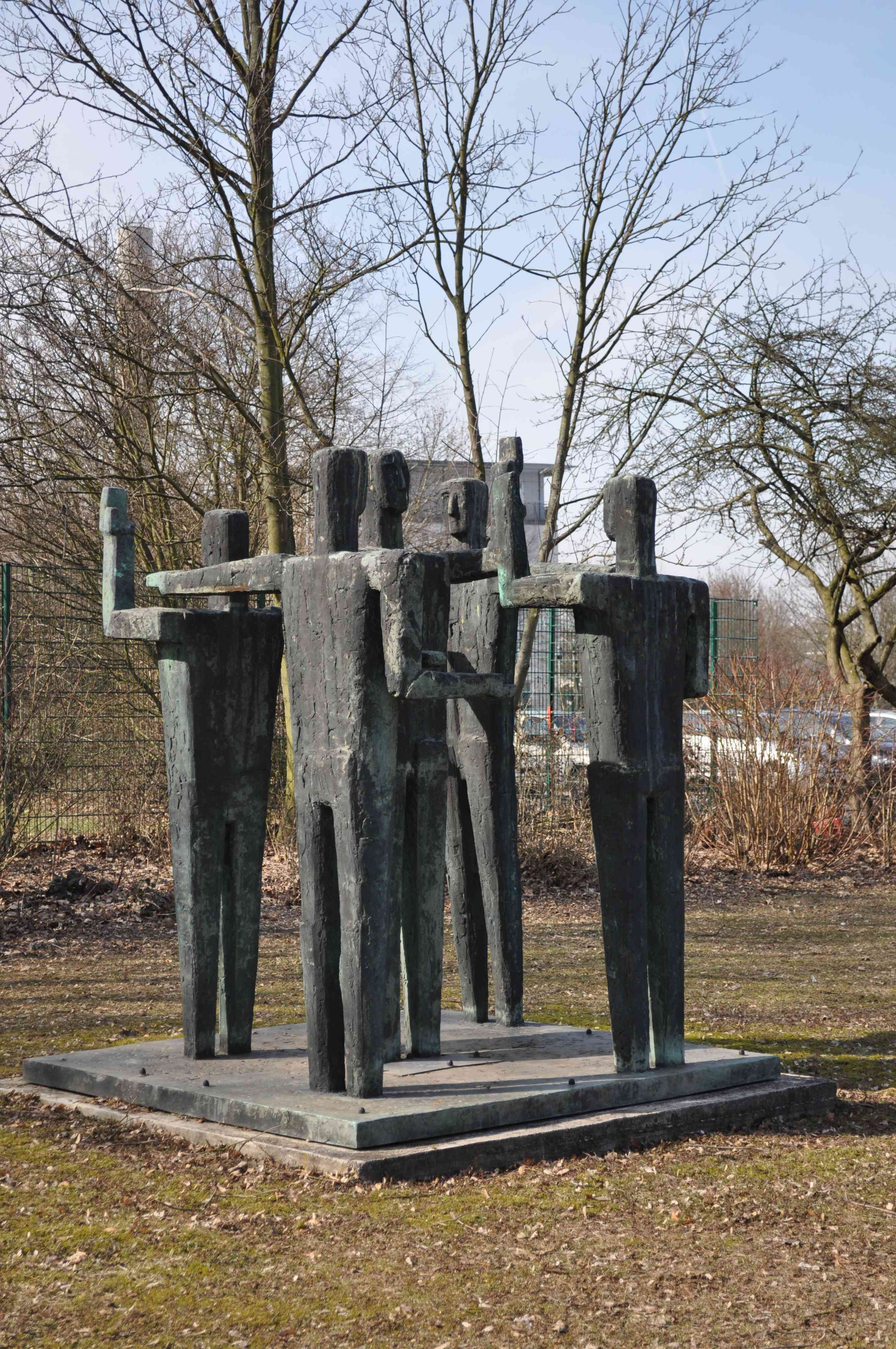 Skulptur von Christine Stadler auf dem Gelände des technischen Zentrums der SEB AG in Nieder-Eschbach